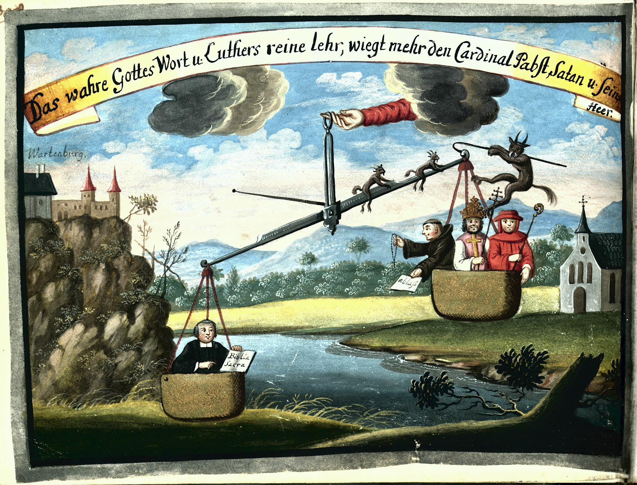 siehe Abbildung